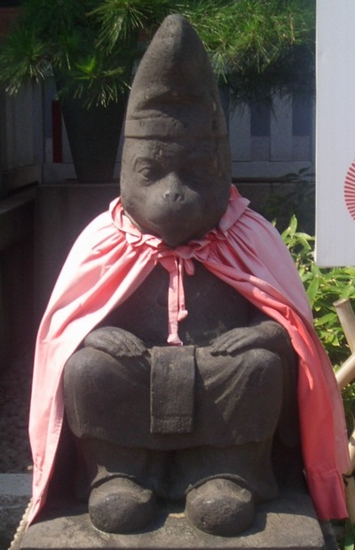 Saru-gami, Hie Shrine, Tokyo, Japan (東京都千代田区・日枝神社の猿神像)